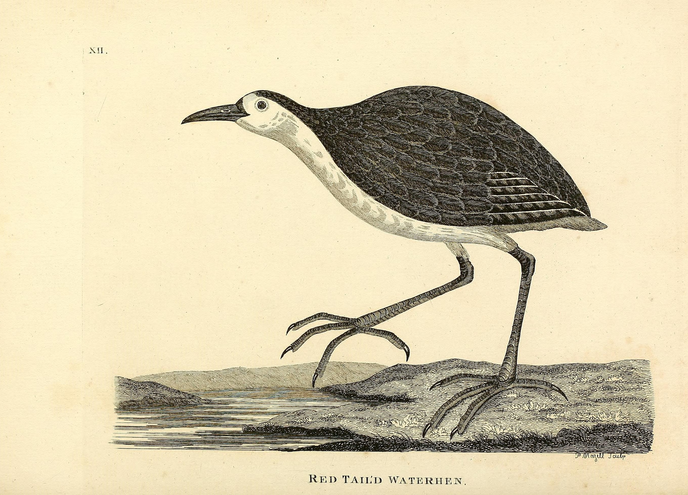 a p4 .^i